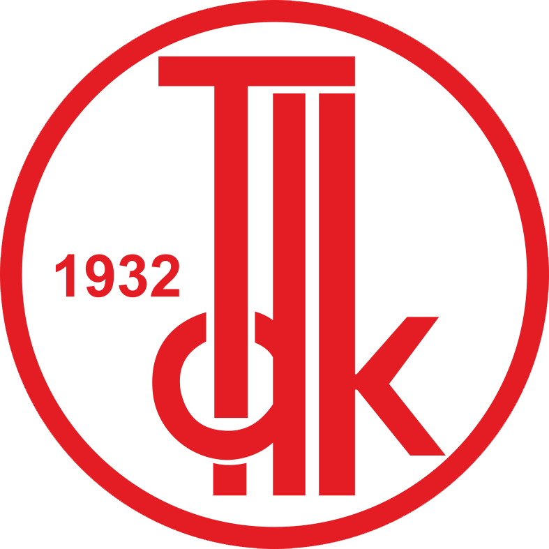 Türk Dil Kurumunun logosu.